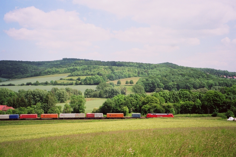 Güterzug auf der Nord-Süd-Strecke bei Friedland, Niedersachsen, dahinter der alte Damm nach Arenshausen. Im Hintergrund der südwestliche Reinhäuser Wald mit Plesse, Bocksbühl, Fritzeberg und Steinkopf. (Cargo Train near Friedland, Lower Saxony, Germany).